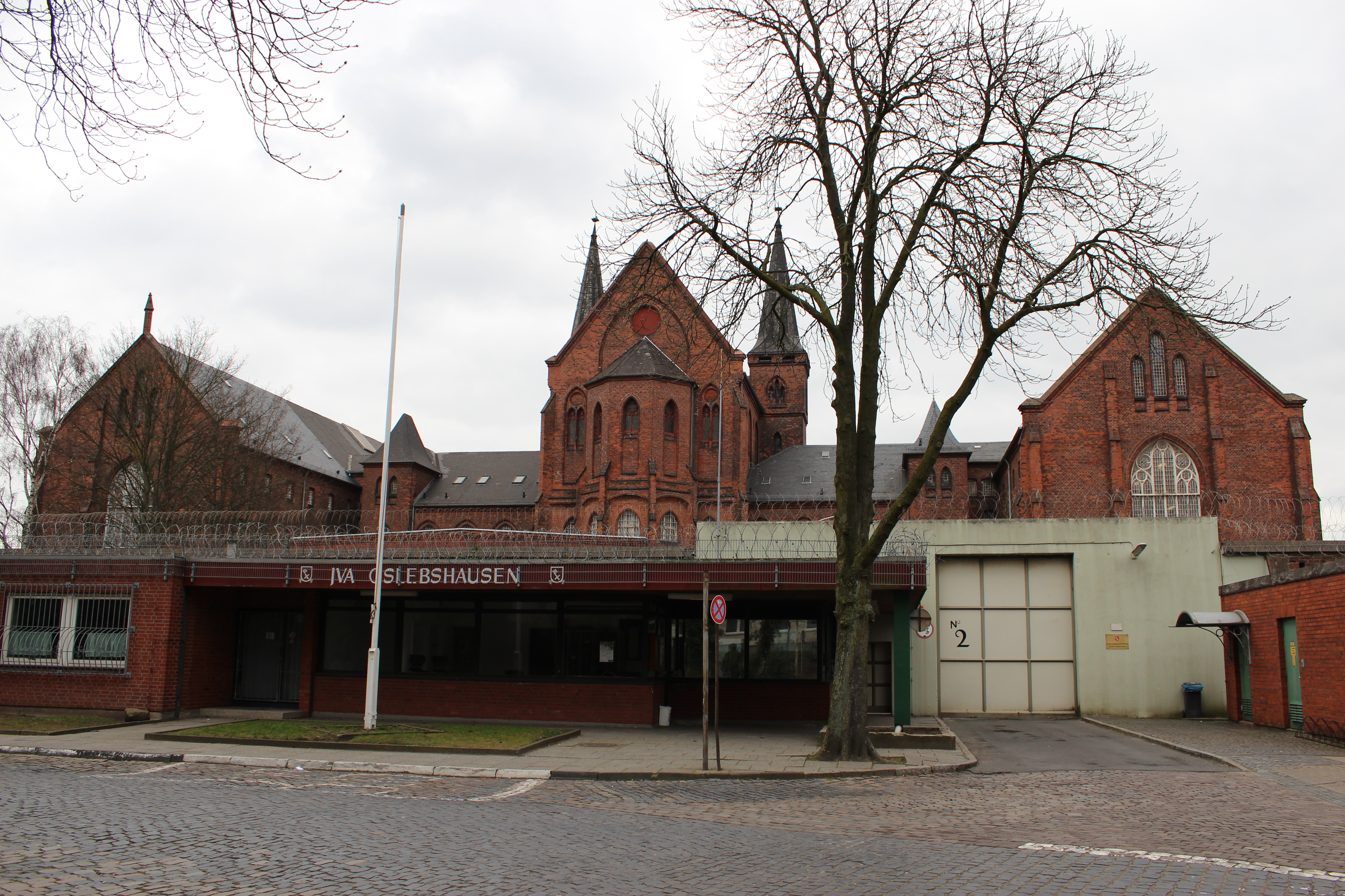 Strafanstalt Oslebshausen, Justizvollzugsanstalt Oslebshausen in Bremen, Sonnemannstraße 1. Die Denkmalgruppe ist ein geschütztes Kulturdenkmal in der Freien Hansestadt Bremen, mit der Nr. 1151 beim Landesamt für Denkmalpflege registriert.